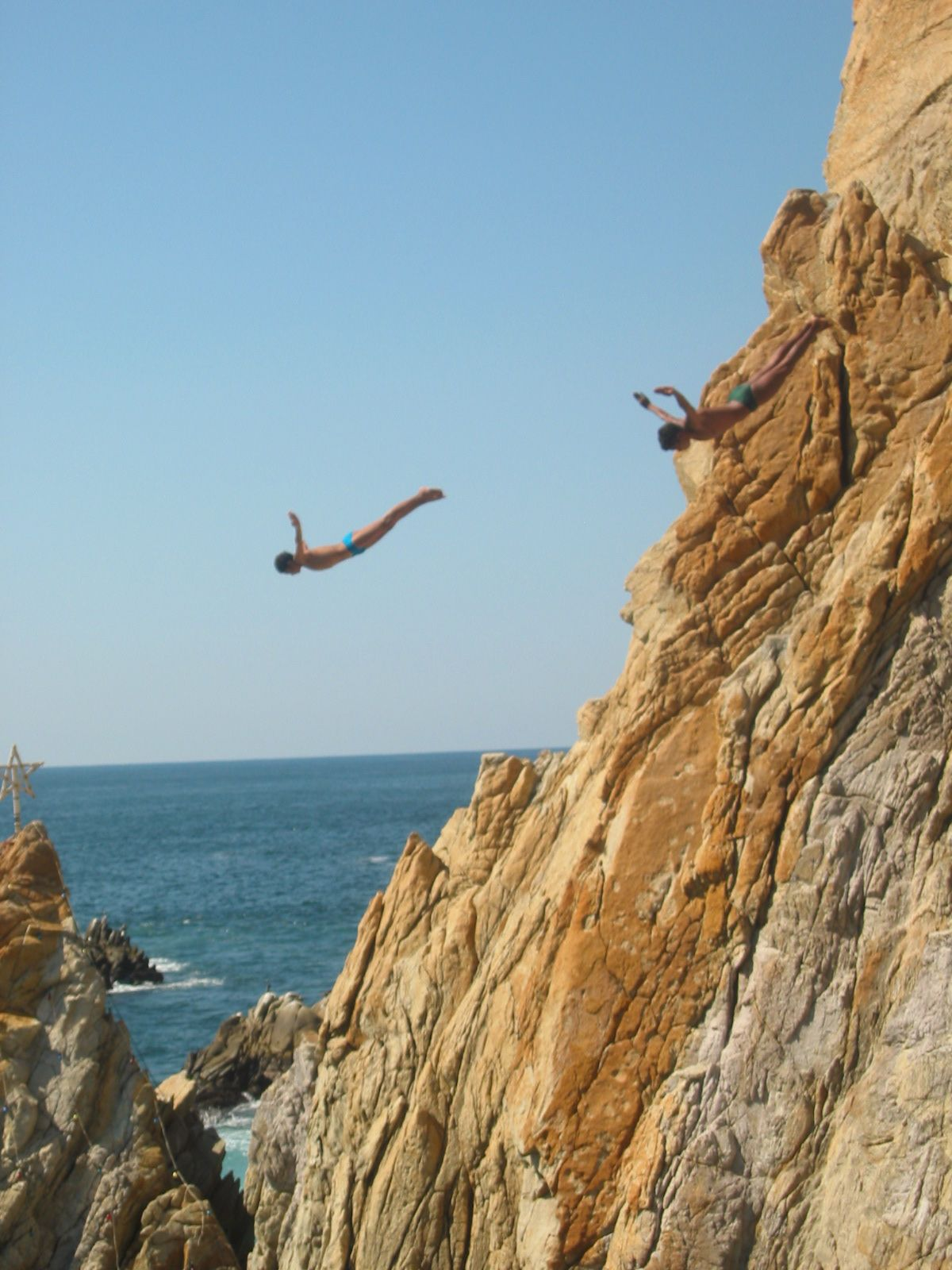 Clavadistas de La Quebrada in Acapulco, Guerrero, México.